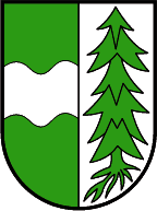 Krumbach, Vorarlberg: Ein von Grün und Silber gespaltener Schild, dessen rechtes Feld von einem silbernen Wellenbalken durchzogen wird, während in der linken Hälfte eine natürliche entwurzelte Tanne abgeledigt erscheint. Den Schild umgibt eine ornamentierte bronzefarbige Randeinfassung. (Verleihung: 6. Oktober 1928)